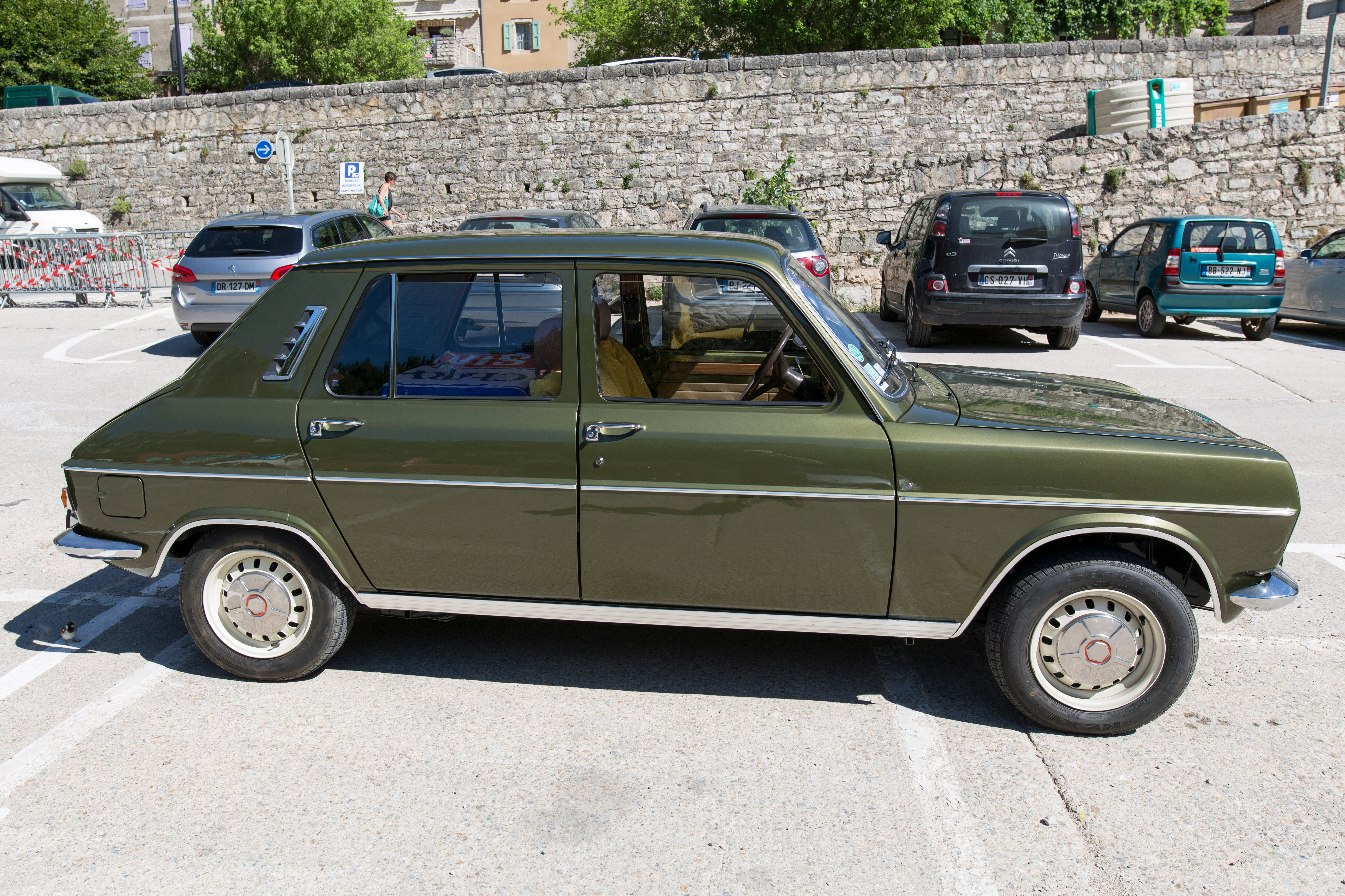 Simca 1100 à Sainte-Énimie